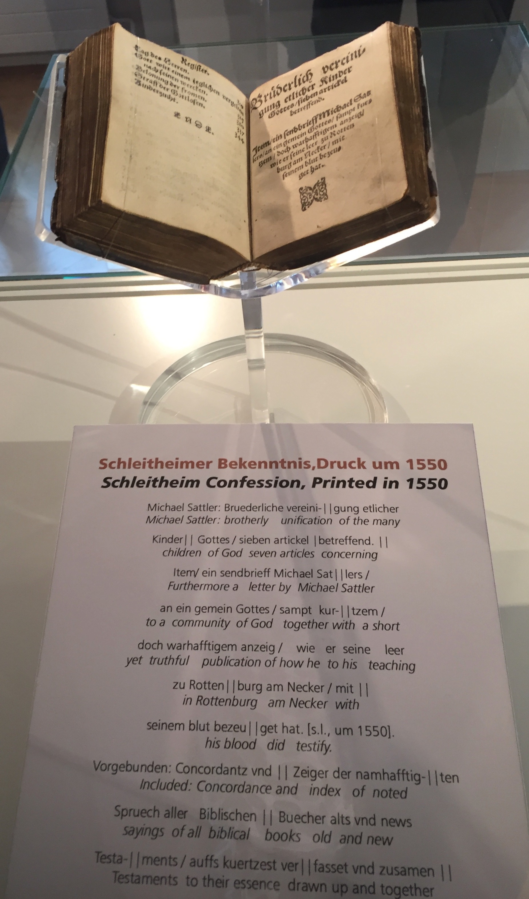 Eines der zwei noch existierenden Exemplare des Schleitheimer Artikels von 1527 ist im Heimatmuseum Schleitheim ausgestellt